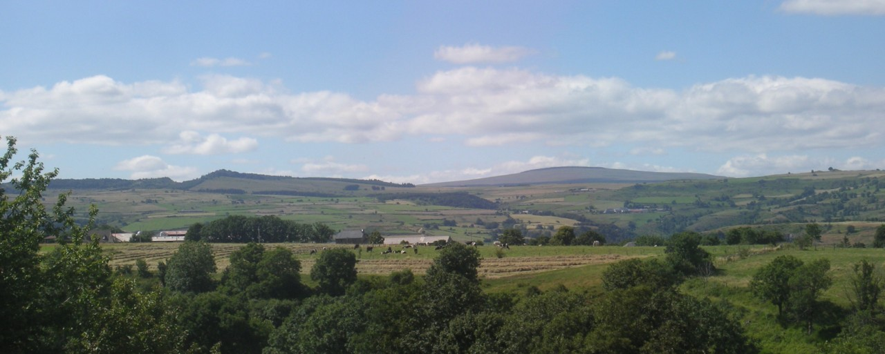 Les Brèches de Jignol et le signal du Luguet (15) Cézallier - France